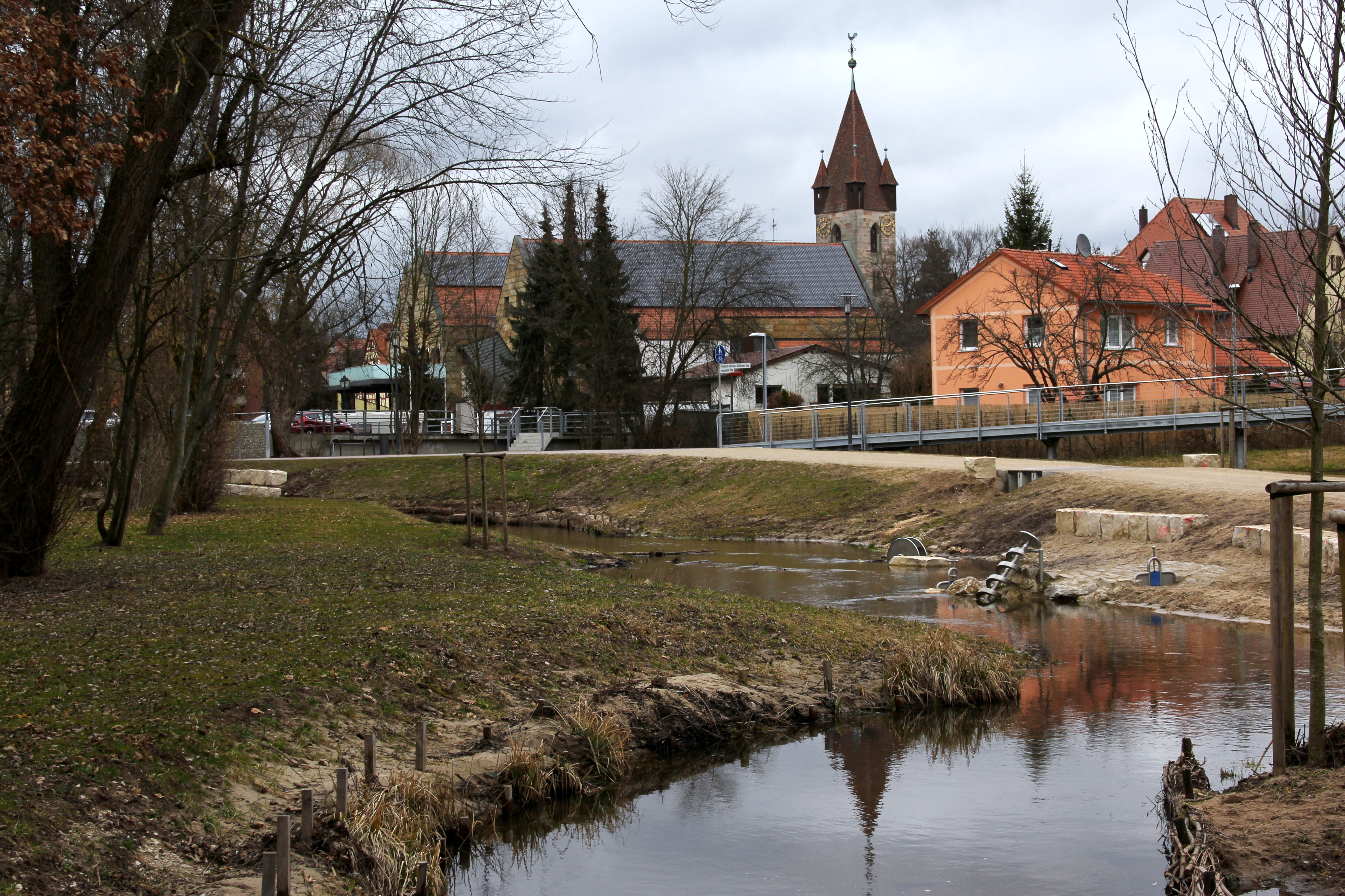 Feucht, Blick auf Ortskern mit Gauchsbach